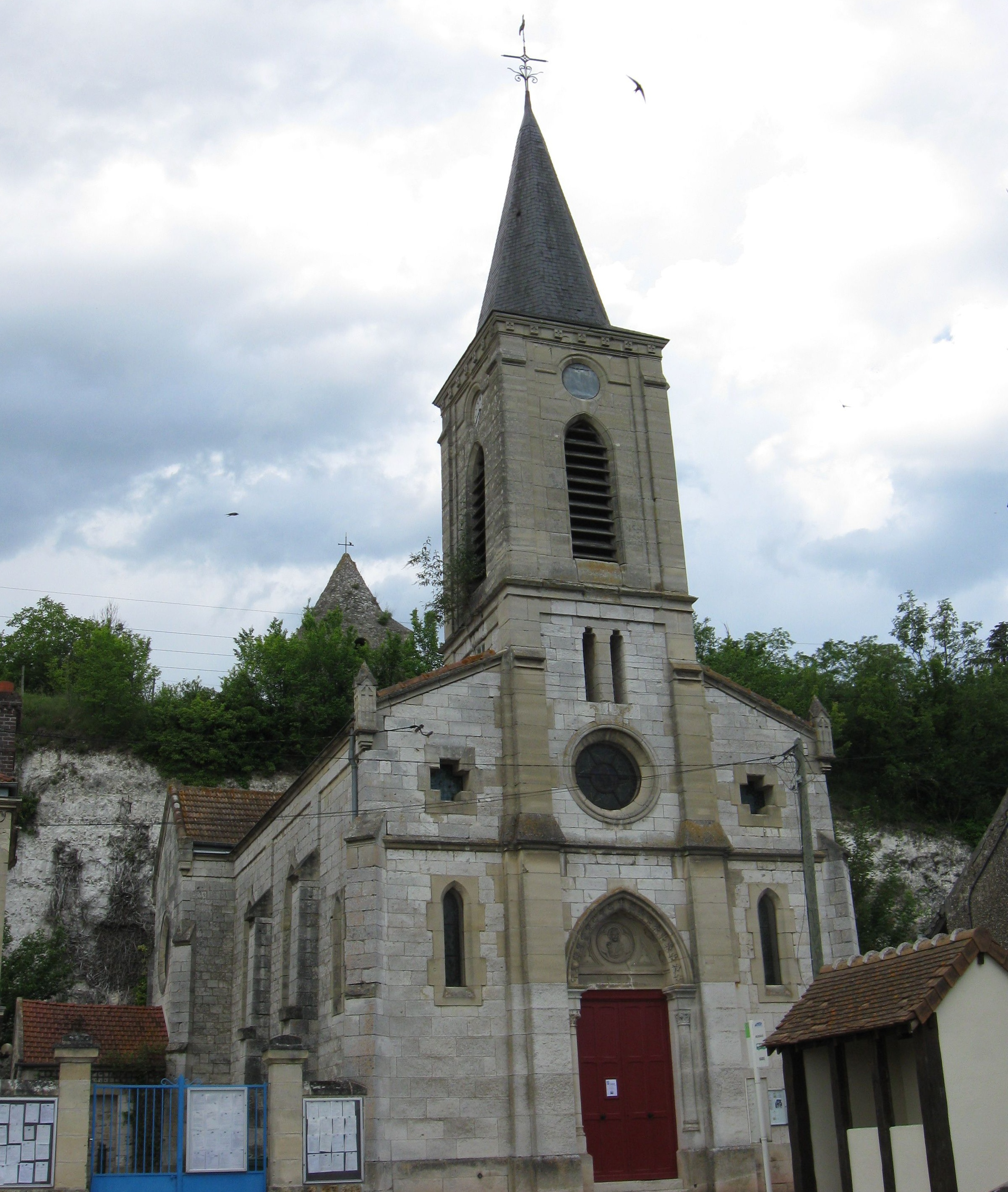 Église Saint-Léger de Mousseaux-sur-Seine. (département des Yvelines, région Île-de-France).